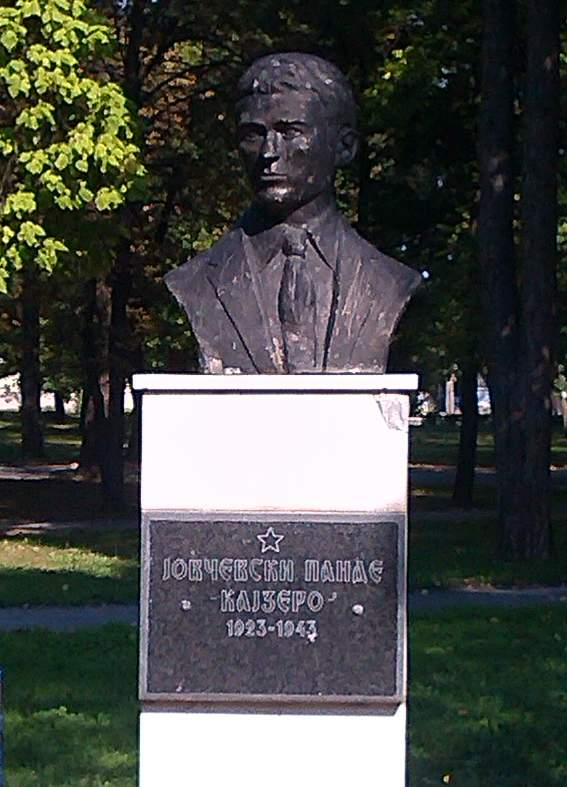 Биста на Панде Кајзеро во Градскиот парк во Битола